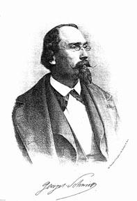 Georg Schmitt, Komponist, Domorganist in Trier, Organist in St. Sulpice und Saint-Germain-des-Prés in Paris